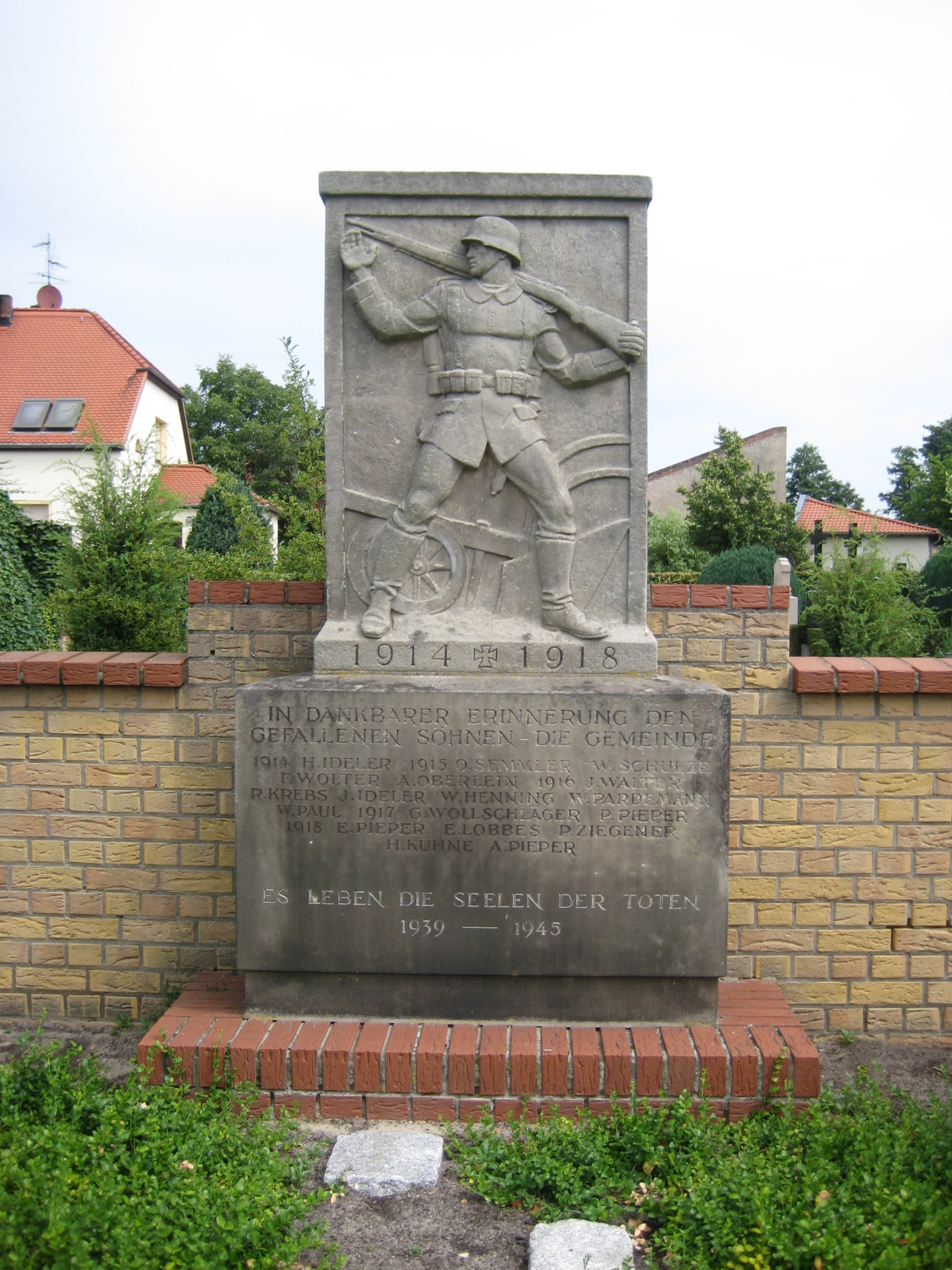 Denkmal 1. und 2.Weltkrieg - Ahrensdorf